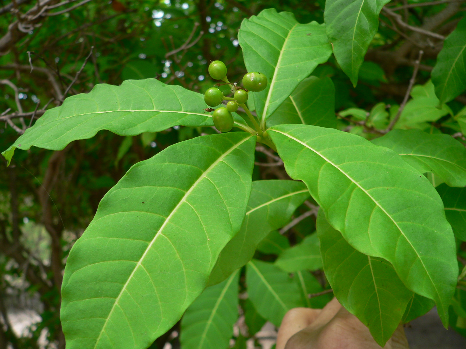 Rauvolfia viridis, fruit, Guadeloupe